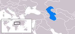 Kaspische Zee locatie; aangepast van locatie Azerbeidzjan.